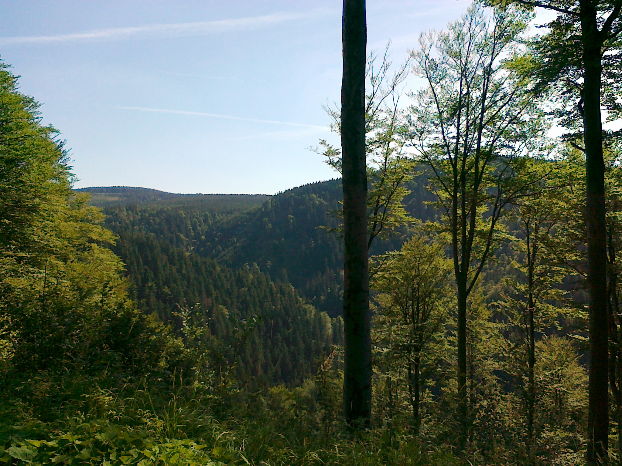 Widok na górę Děrná, po prawej za drzewami góra Malé Bradlo